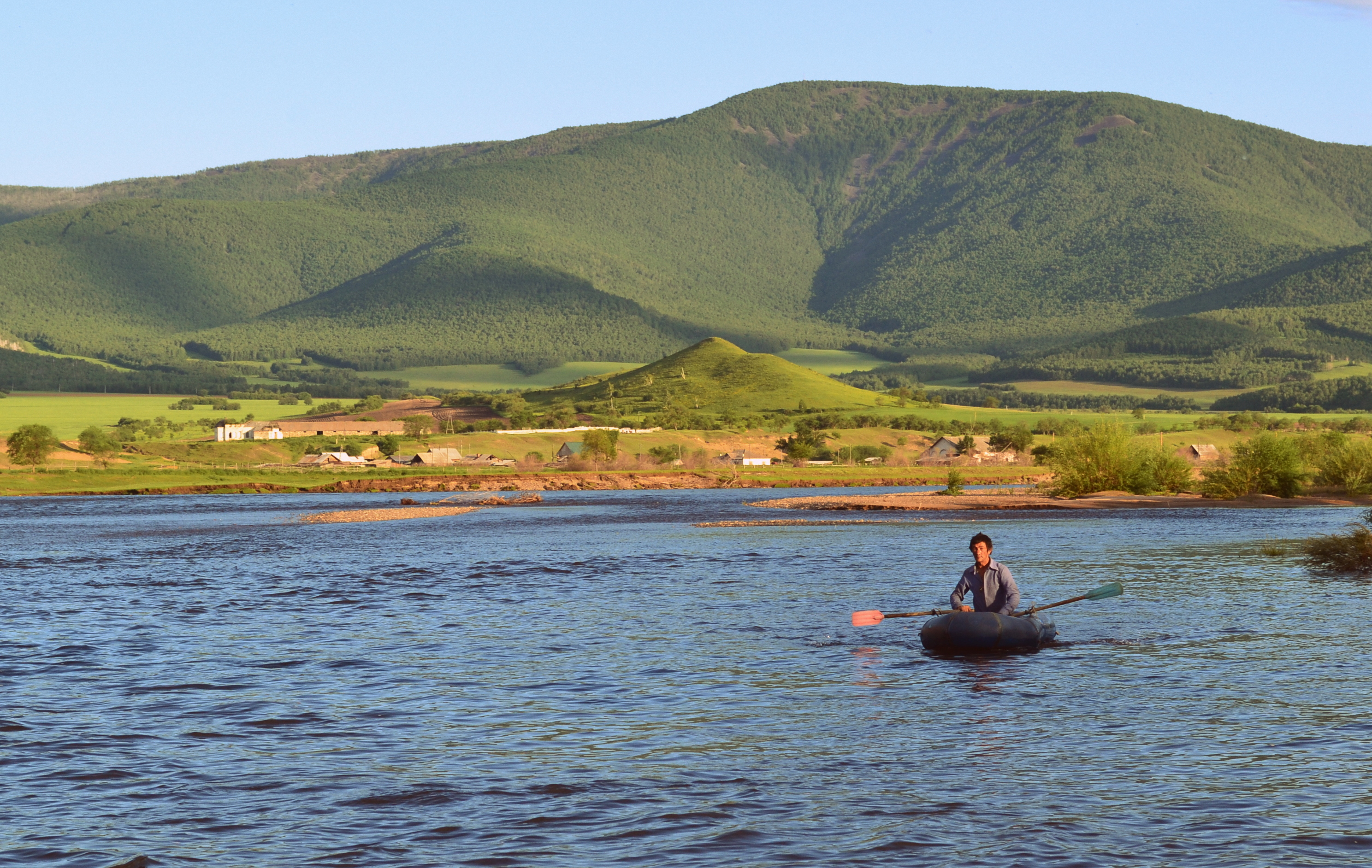 Река Джида с видом на село Баян. Джидинский район, Республика Бурятия